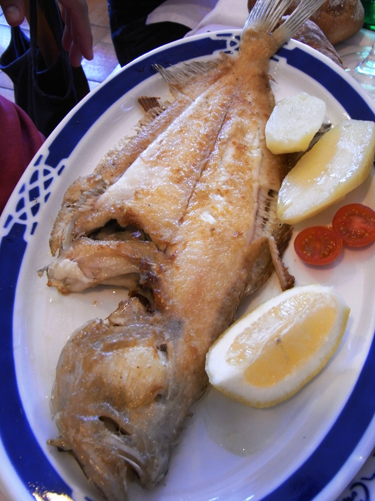 Gallo frito, servido en un restaurante de Asturias.